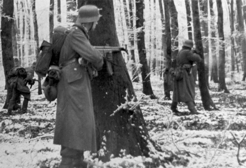 ADN-ZB/Archiv II. Weltkrieg 1939-45 Die Ardennoffensive der deutschen Wehrmacht beginnt am 16. Dezember 1944 gegen die alliierten Truppen in Westeuropa. Nach anfänglichen Erfolgen müssen sich die deutschen Truppen bis Ende Januar 1945 auf ihre Ausgangsstellungen zurückziehen. Ein deutsches Regiment ist in einem Wald in Luxemburg eingeschlossen. Hinter Bäumen feuern die Grenadiere auf den Gegner und versuchen durchzubrechen; aufgenommen am 22.12.1944 [Herausgabedatum] (Lange)